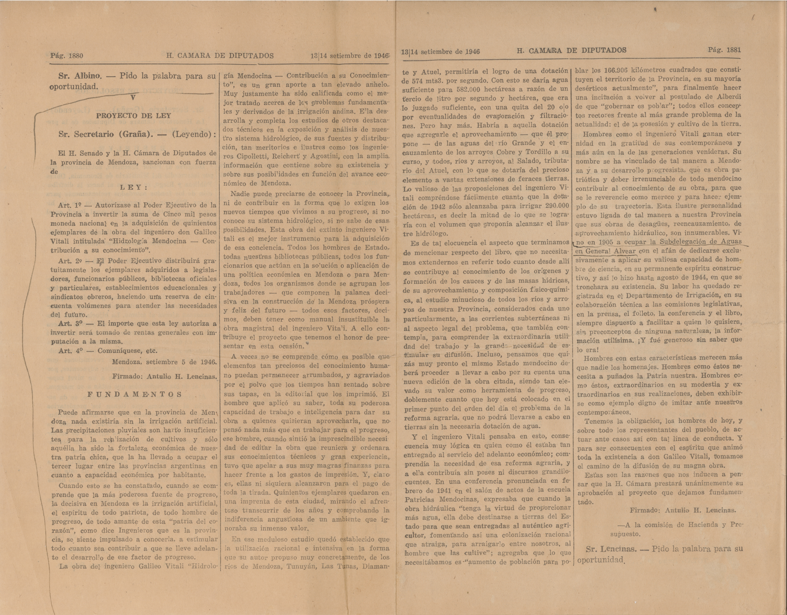 Publicación del proyecto de ley de 1548, en diario de sesiones de la Cámara de Diputados de Mendoza de 1946.